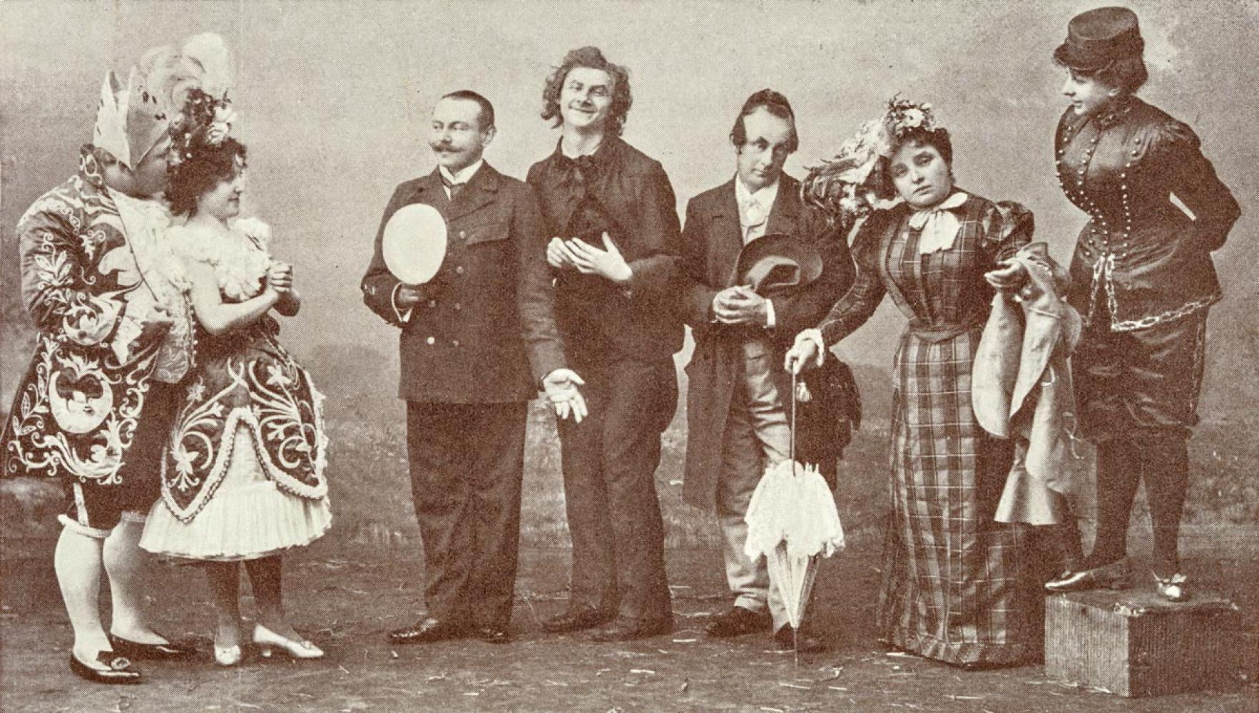 Aufnahme aus einer Szene aus der Operette Frau Luna im Apollotheater Berlin (Stadtmuseum Berlin)